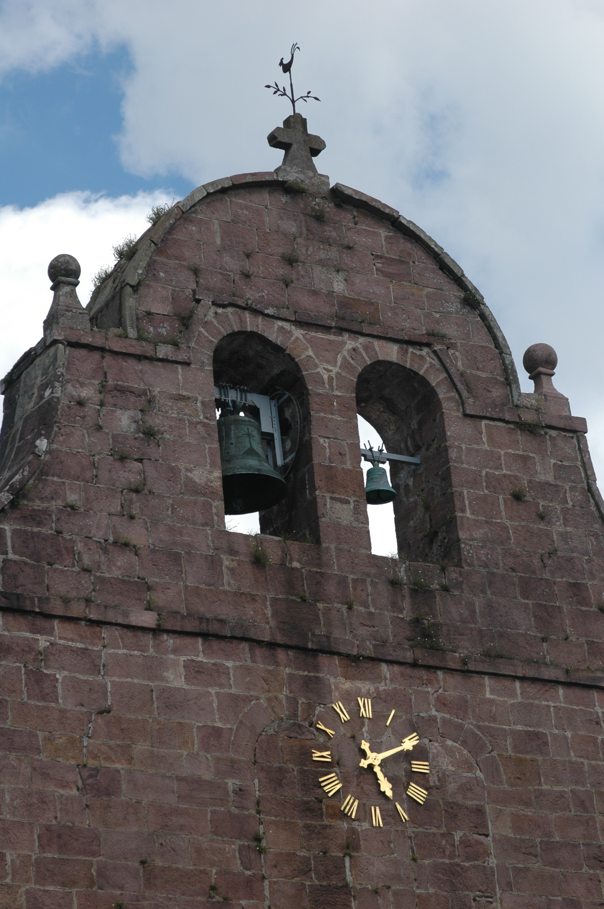 Bidarray, détail de l'église. Photo prise le 03/08/06 par Harrieta171